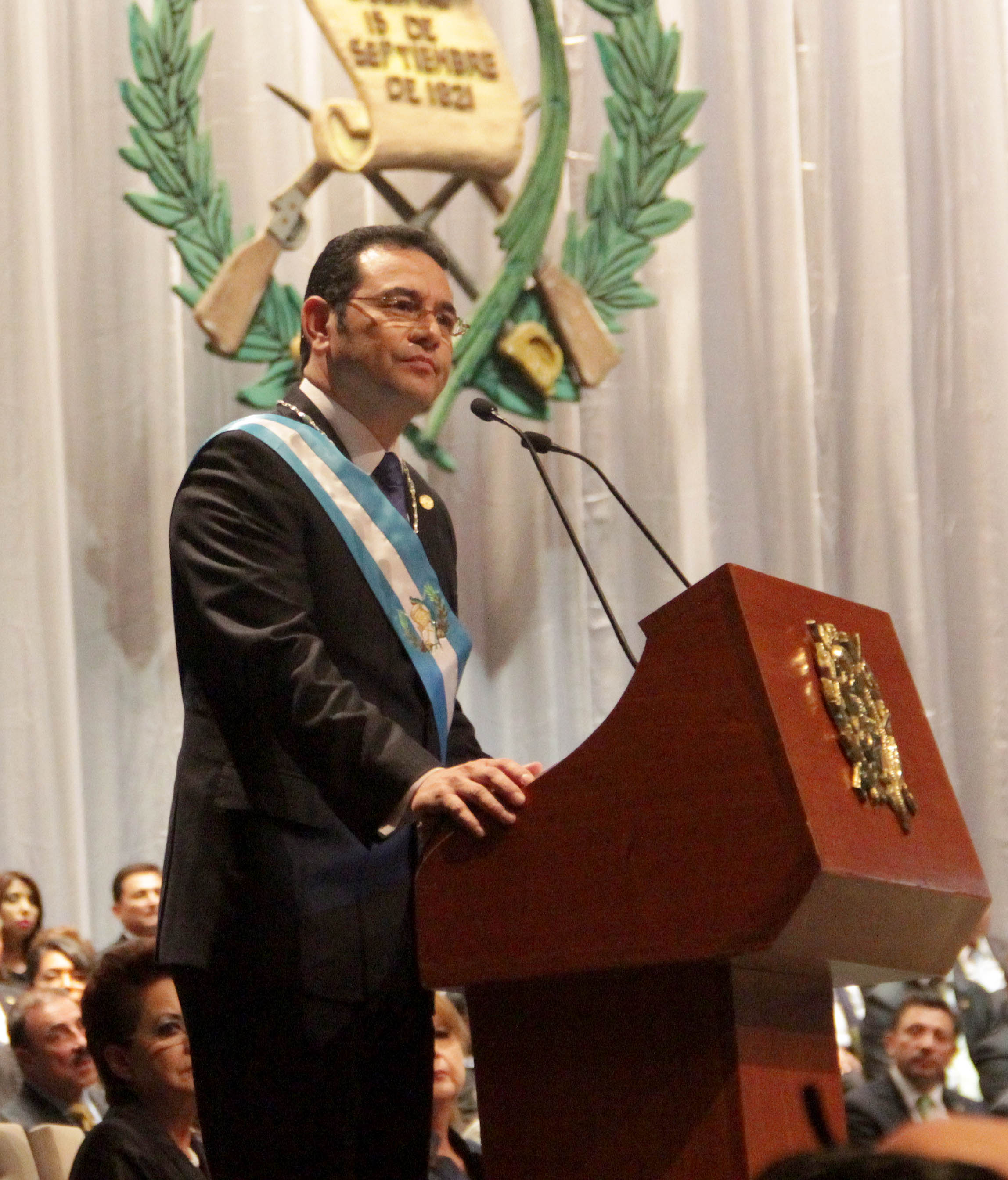 Presidented e Guatemala, Jimmy Morales.